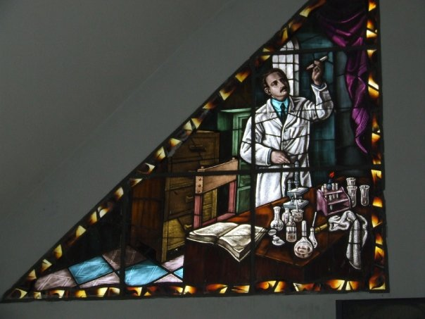 Vitral Iglesia Santuario Jose Gregorio Hernandez Isnotu Trujillo